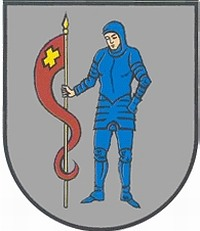 Беларуская (тарашкевіца): Герб Чарнігава (1623)